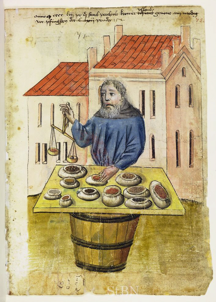 perchtolt (Perchtold; Berthold) kromer genannt vslaub (Krämer genannt Uslaub) , kromer (Krämer; Gewürzkrämer) Transkription und weitere Informationen